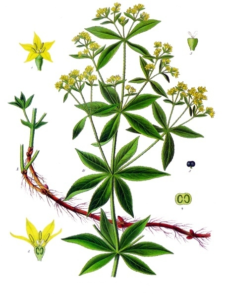 Färberkrapp. A Rhizom der Pflanze. B Blühende Stengelspitze. 1 Blüte; 2 dieselbe im Längsschnitt; 3 Pistill; 4 Ovar im Querschnitt; 5 Frucht. A, B und 5 in natürlicher Grösse; 1, 2, 3, 4 vergrössert.